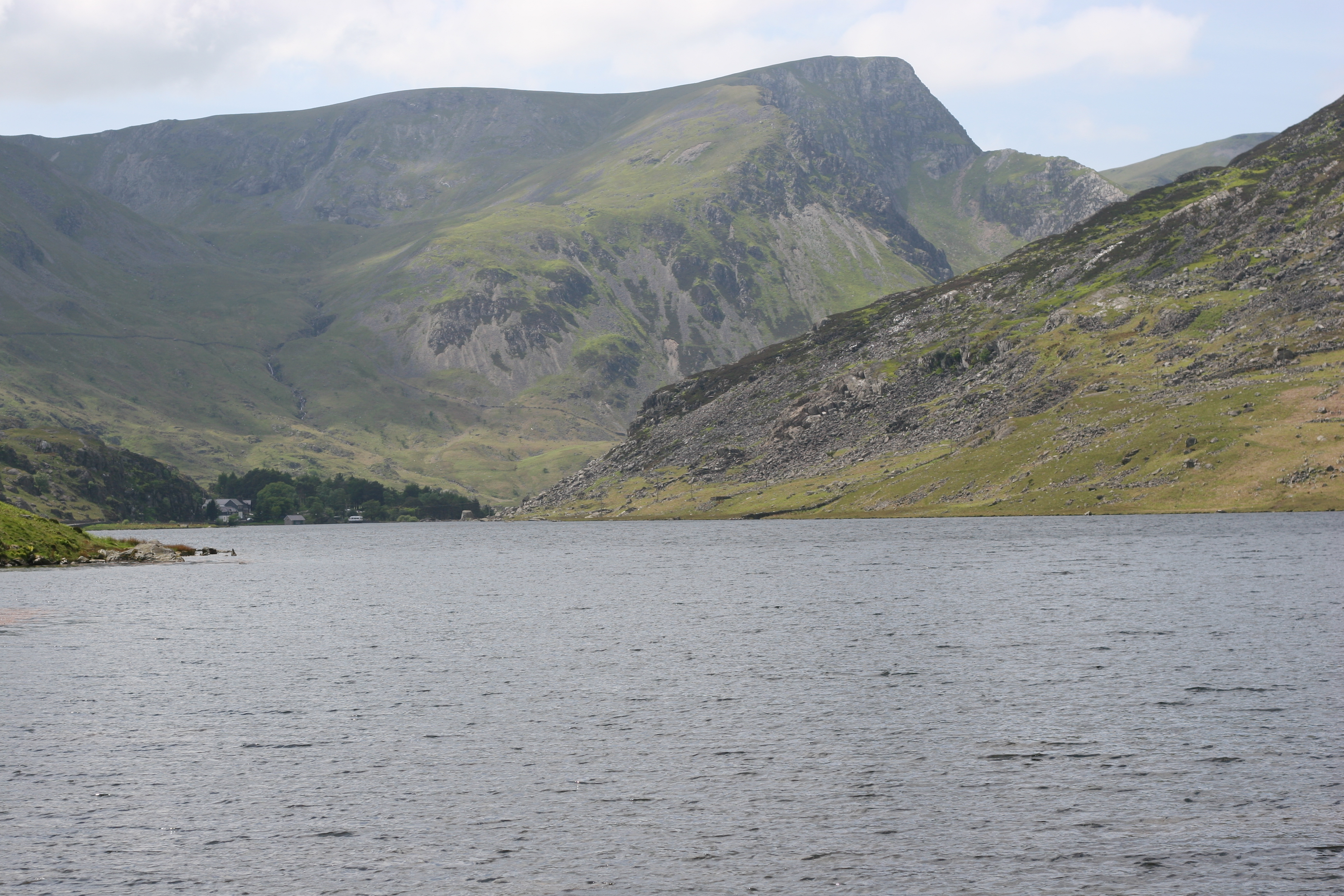 Llyn Ogwen, Conwy, Wales 05/06/2006 Rhion Pritchard : own work